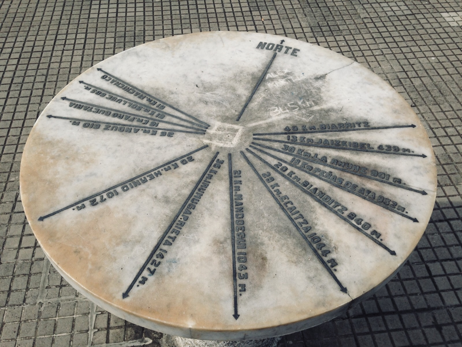 Igeldoko dorre gailurrean dagoen orientazio-mahaia, Igeldo jolas-parkea (Donostia)